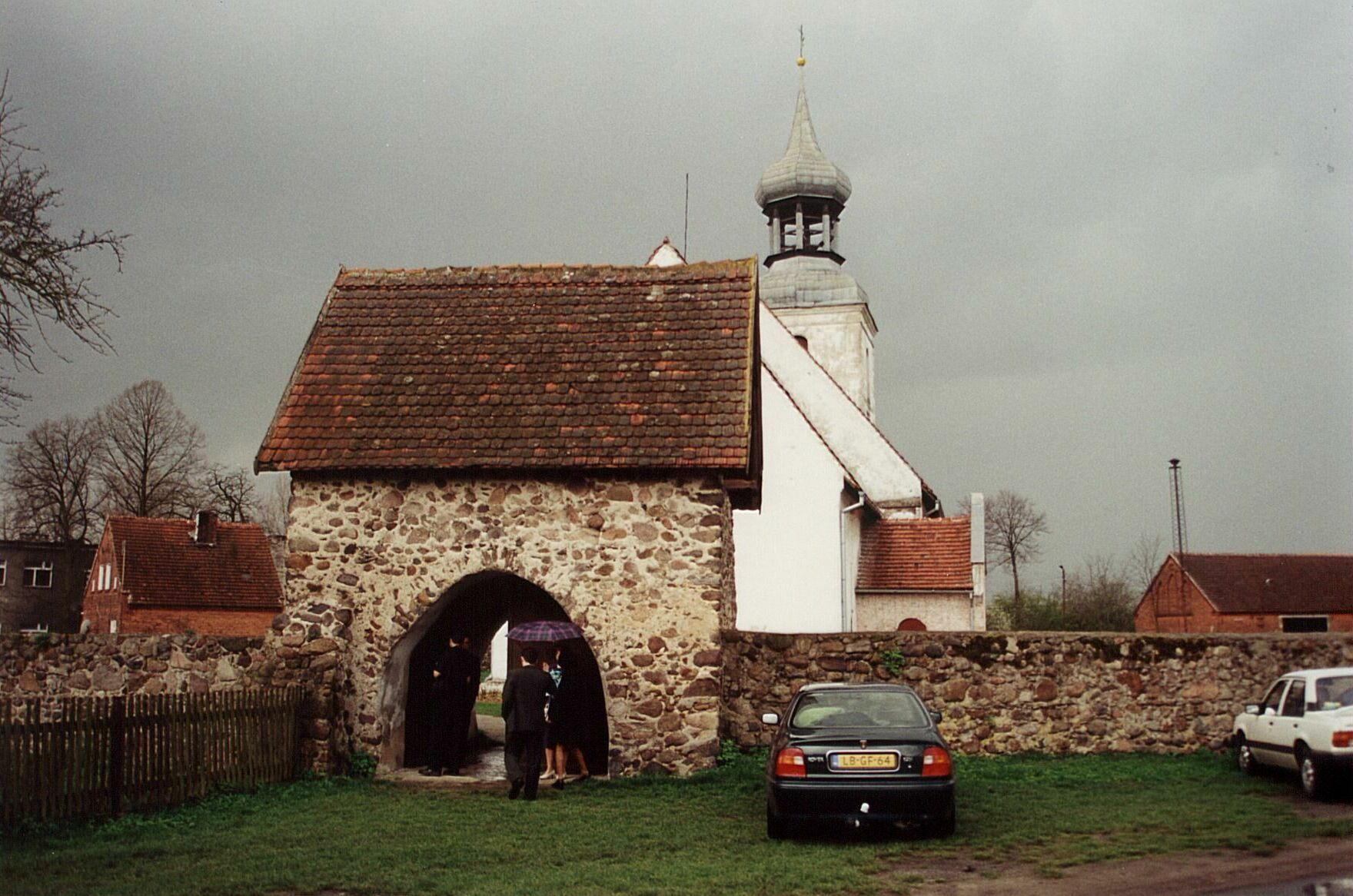 Dzikowice - kościół filialny p.w. św. Marcina, XV, XVII w. (zabytek nr 227 z 27.03.1961)